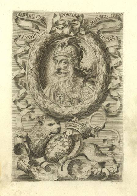 Retrato de Bernardo Ansprando de Platoni, segundo hijo del Rey Desiderio de los lombardos